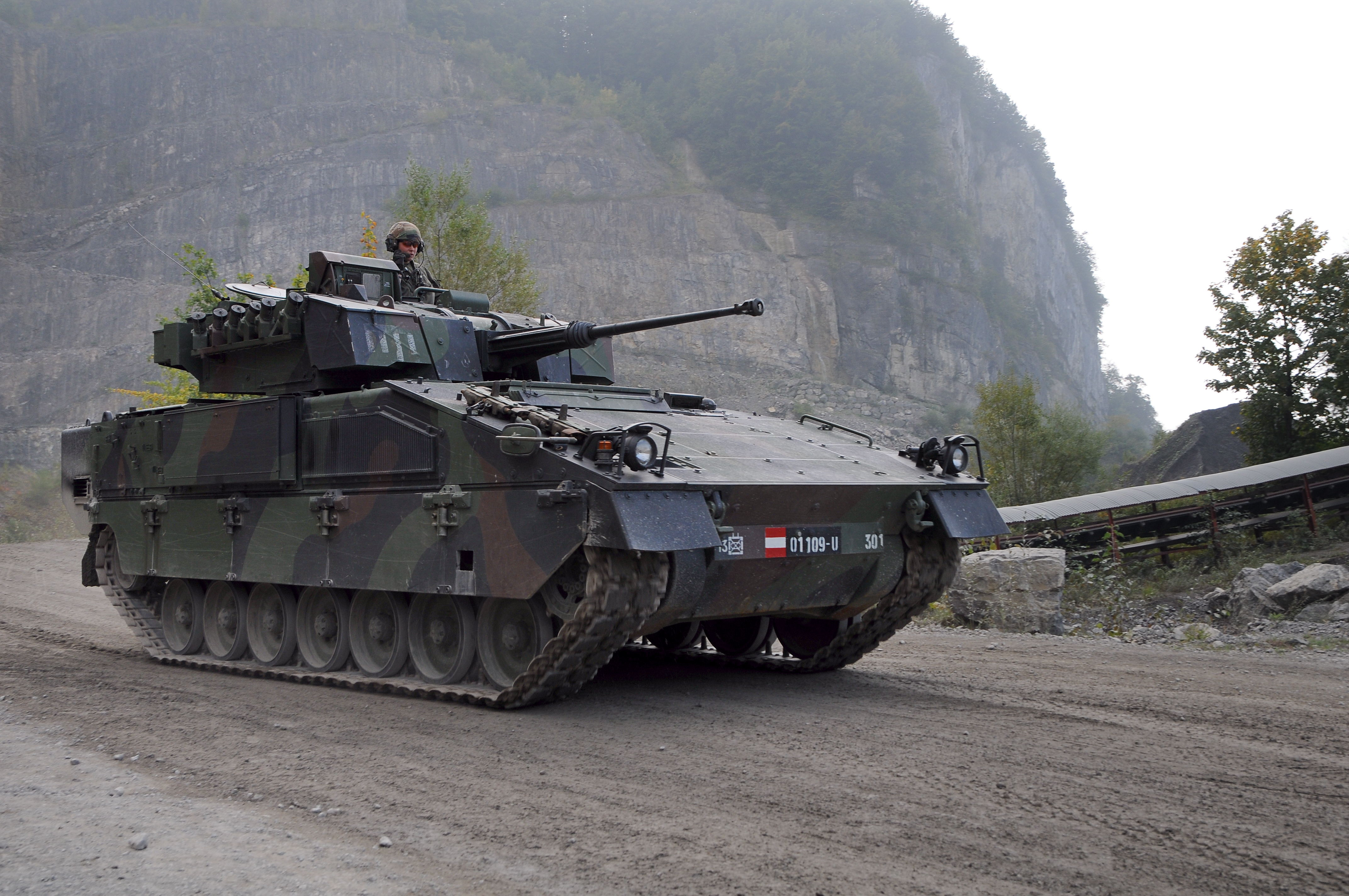 Im Zuge einer Road-Show zeigte das Österreichische Bundesheer im Dornbirner / Hohenemser Steinbruch den Ascod (Austrian-Spanish Co-operative Development), der Name eines Panzerfahrzeugs, das in einer Österreichisch-Spanischen Co-Produktion gefertigt wird. Der Schützenpanzer Ulan wird von der österreichischen Steyr-Daimler-Puch Spezialfahrzeug GmbH und der Pizarro von der spanischen Santa Bárbara Sistemas gefertigt.